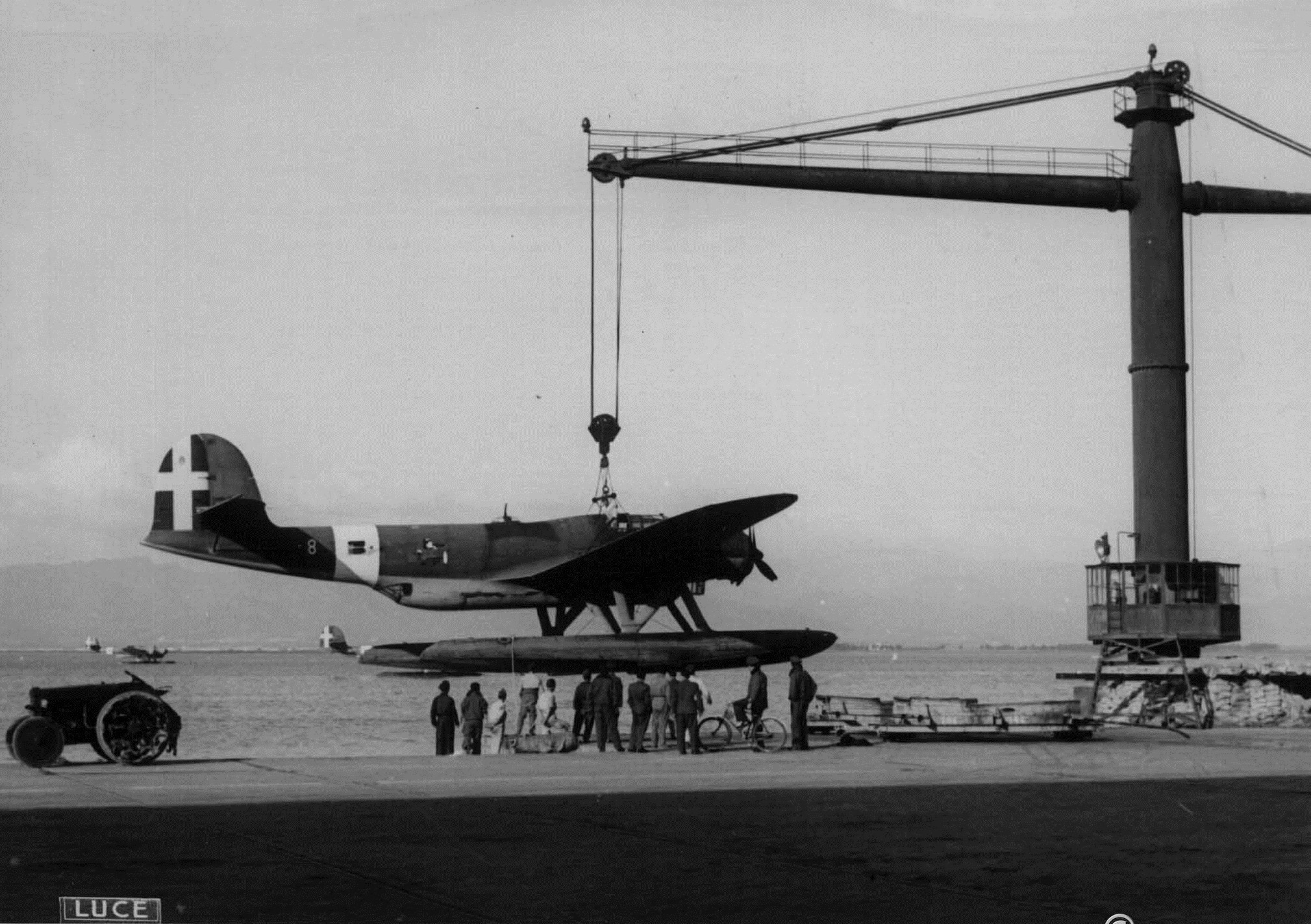 CRDA Cant. Z.506B Airone in rimessaggio